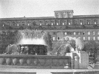 Napoli - Giardini del Molosiglio, fontana dei Papiri. Autore sconosciuto.